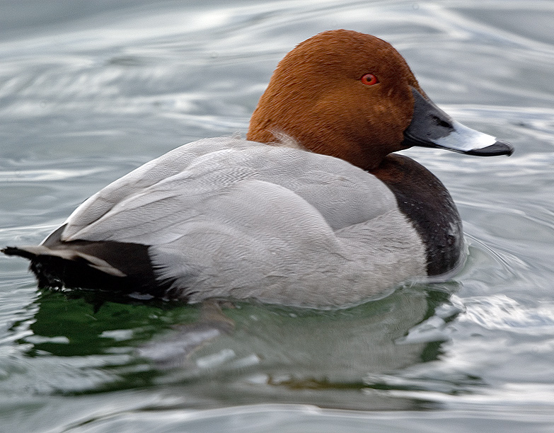 Tafelente